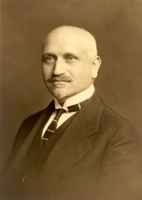 Quido.Vetter - český matematik, pedagog a historik